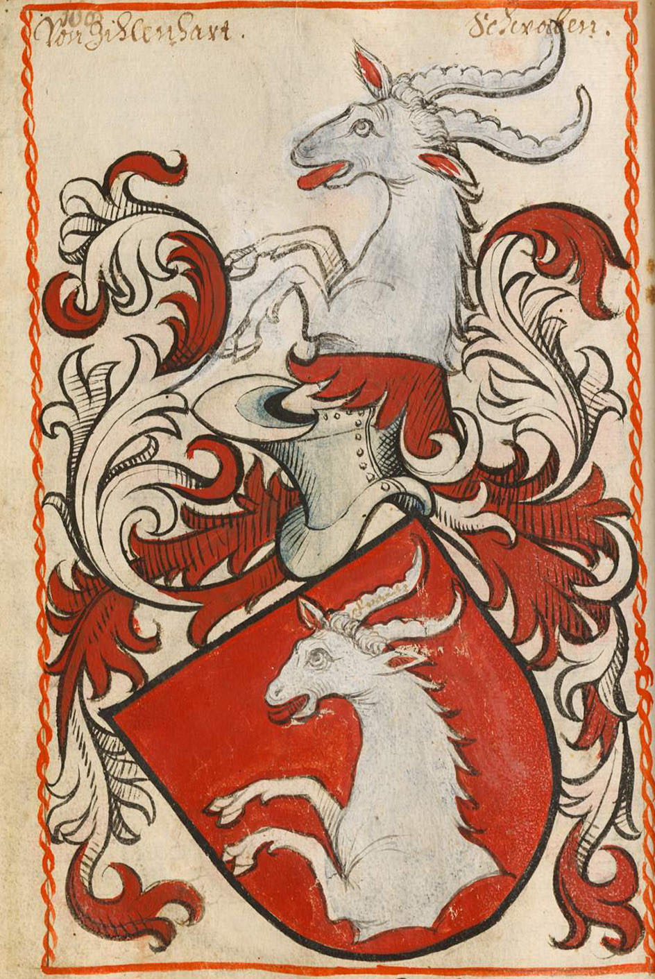 Scheibler'sches Wappenbuch, älterer Teil Züllenhard